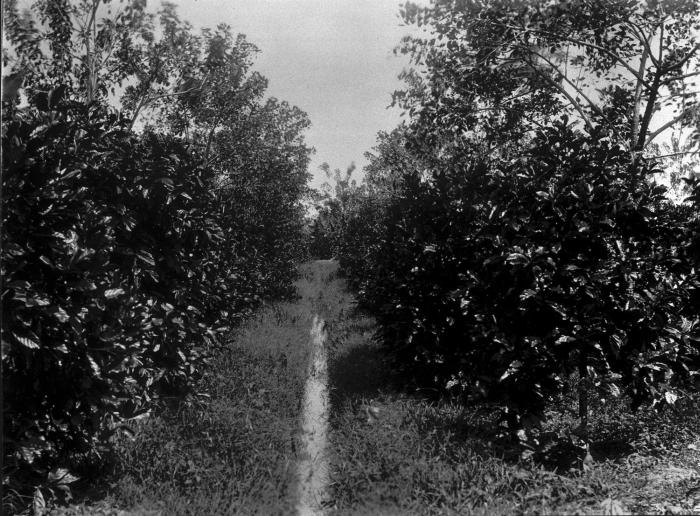 Koffiestruiken op de plantage La Ressource te Suriname